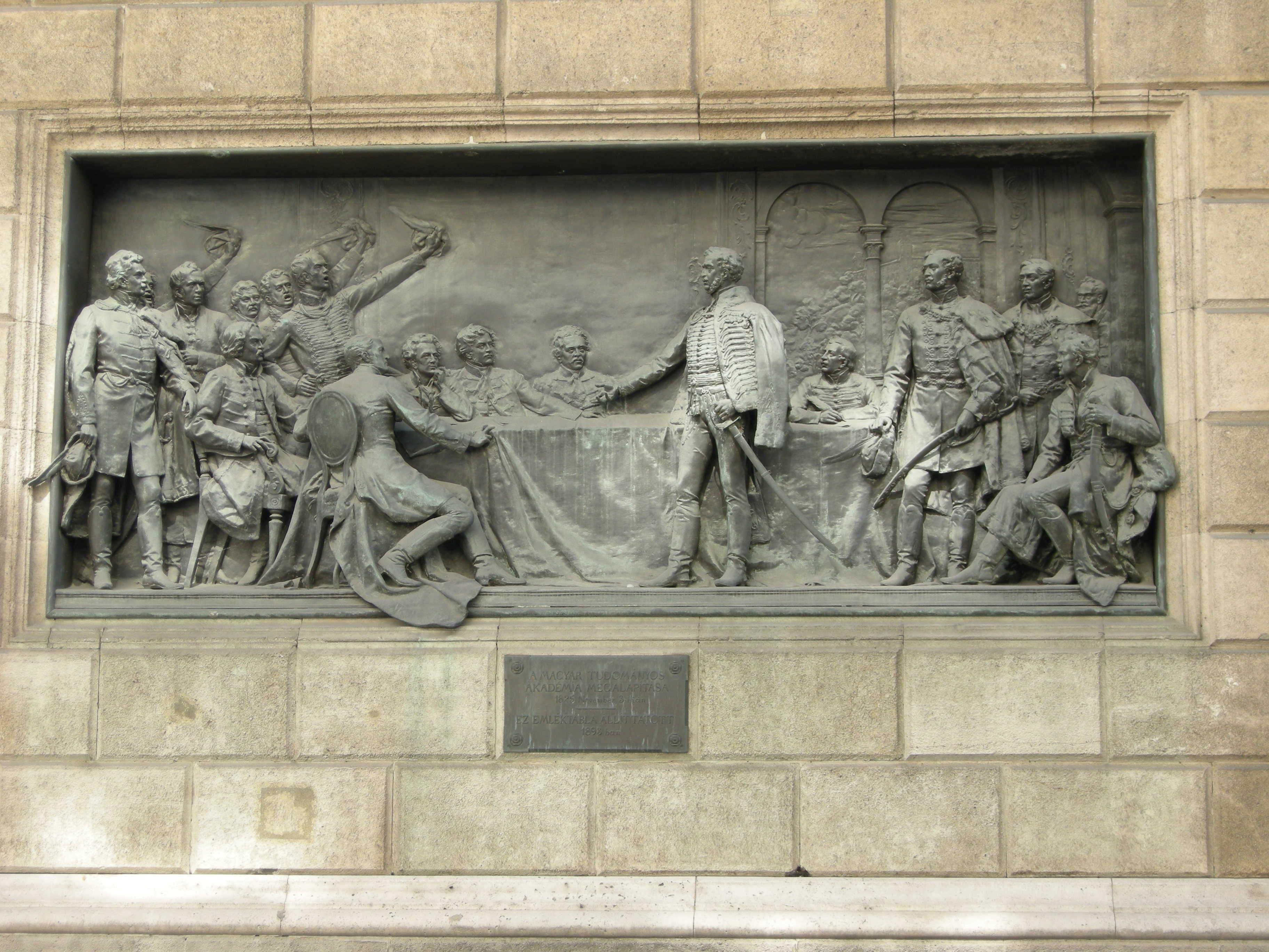 A Magyar Tudományos Akadémia alapítását ábrázoló dombormű az MTA budapesti székházának falán. Holló Barnabás szobrászművész alkotása (1891–93)